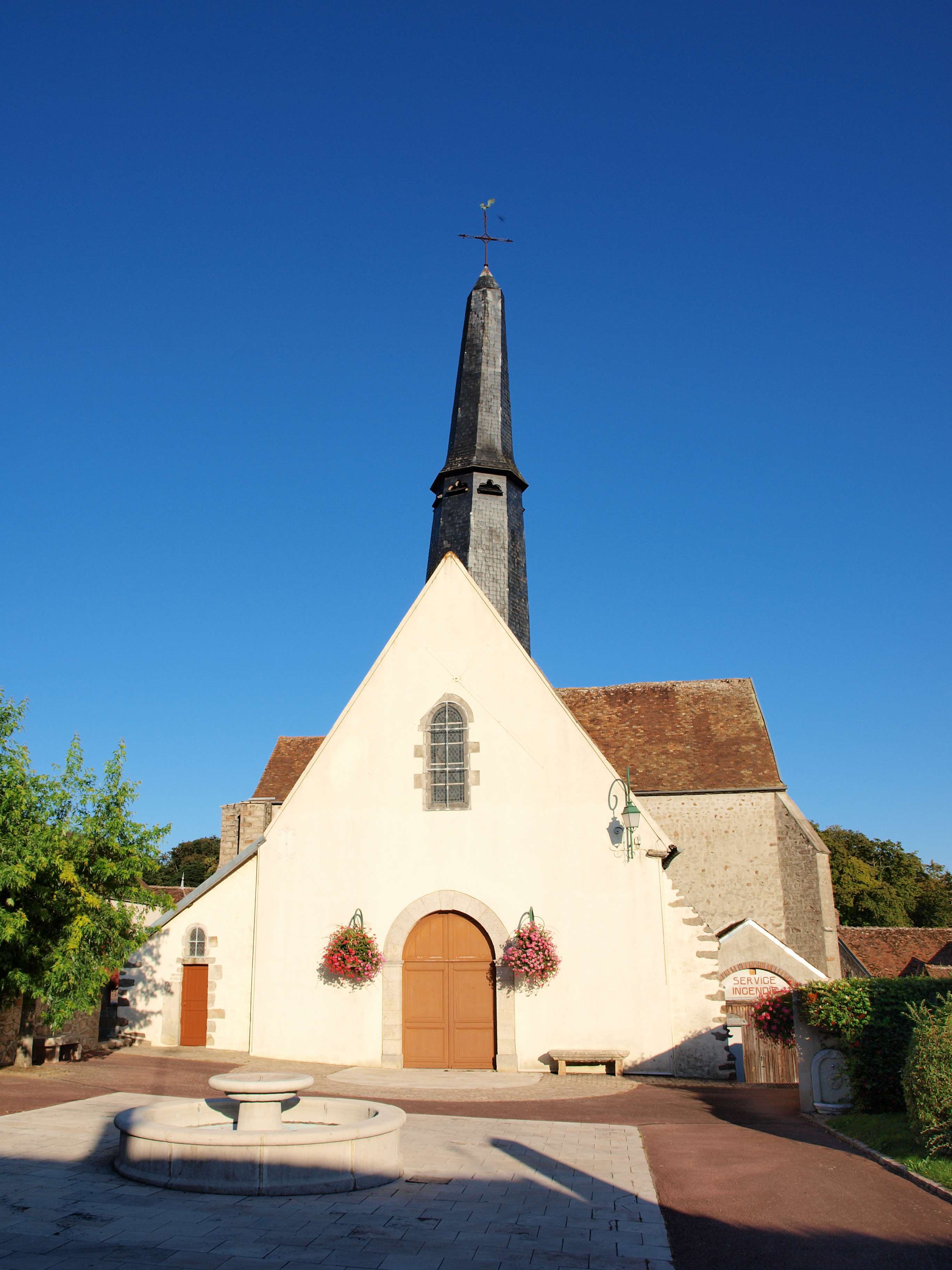 Saint-Hilaire-les-Andrésis (Loiret, France ; église